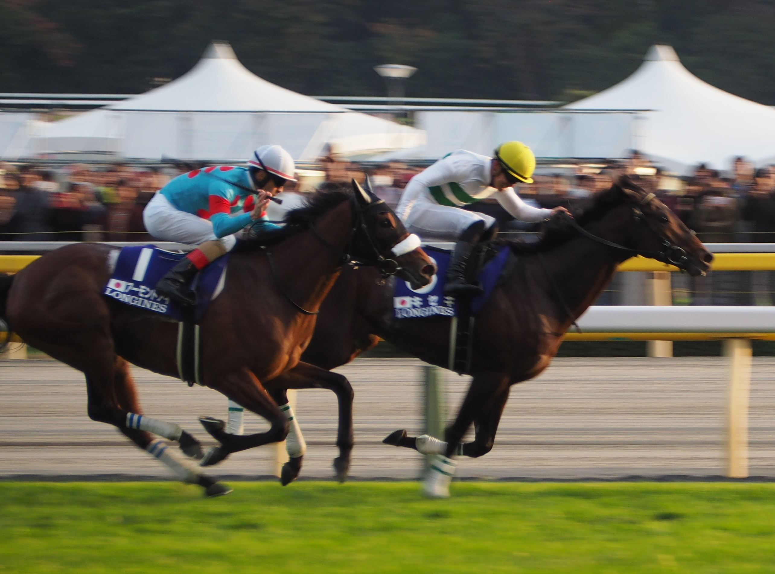 キセキ、アーモンドアイ